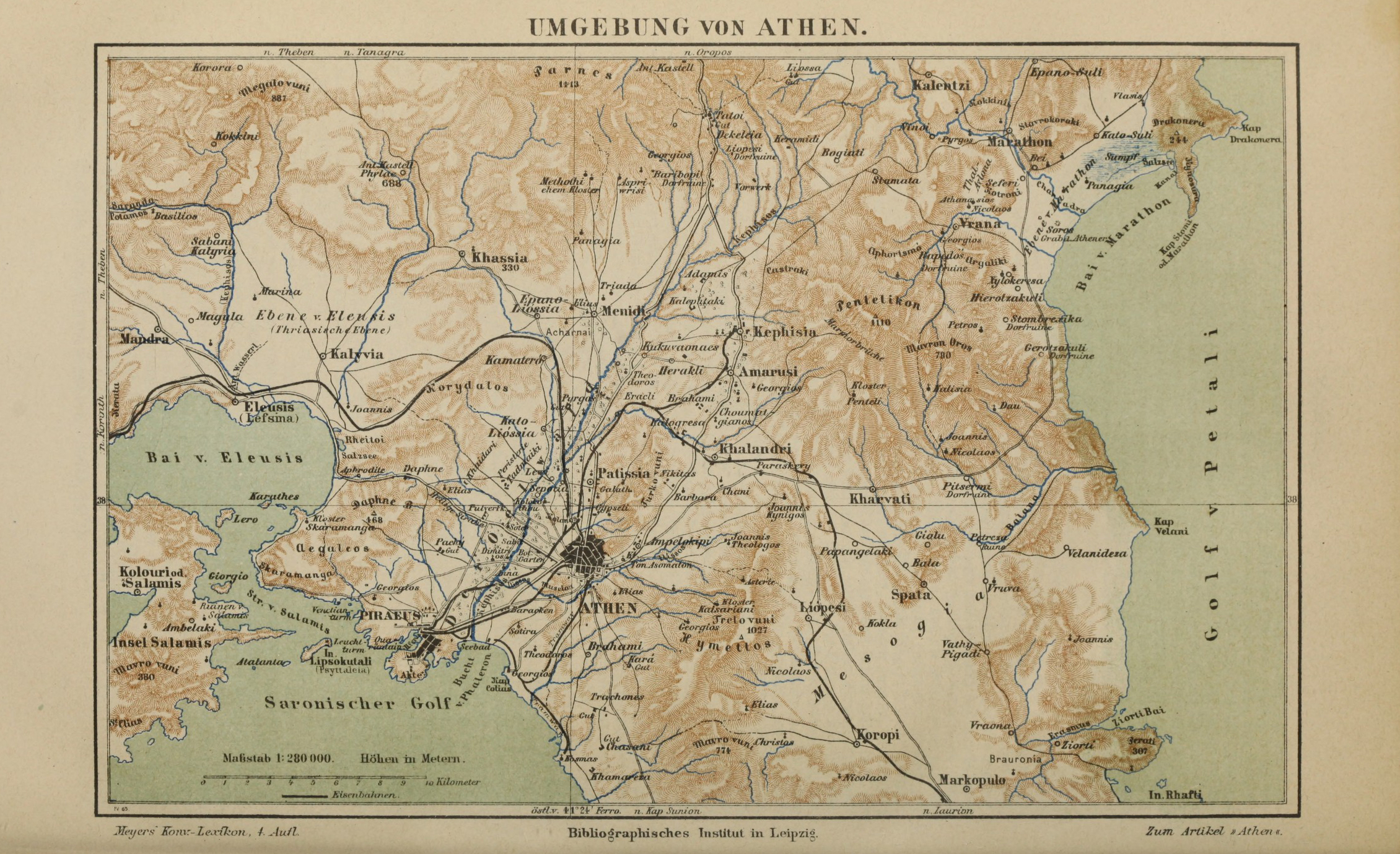 Umgebung von Athen (1 : 280.000)